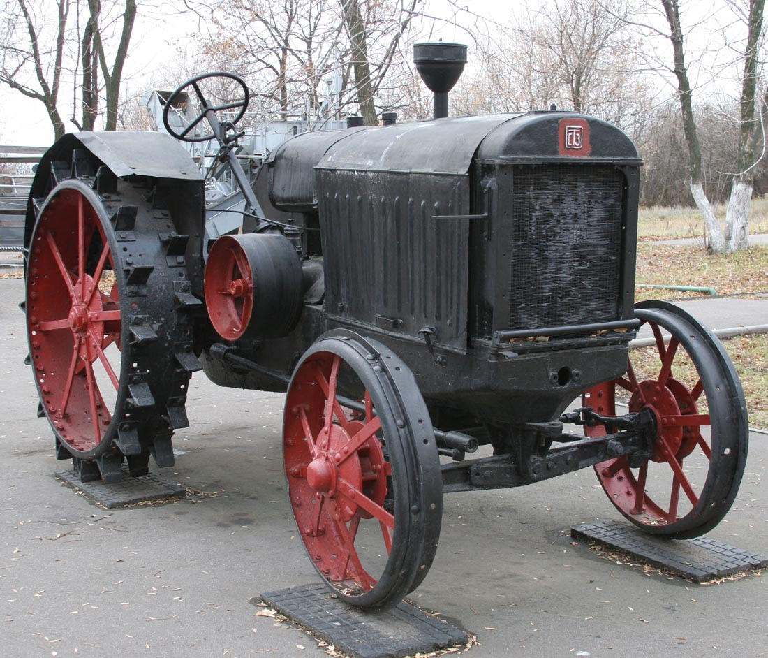 Трактор СХТЗ 15/30 в Саратове на Соколовой горе